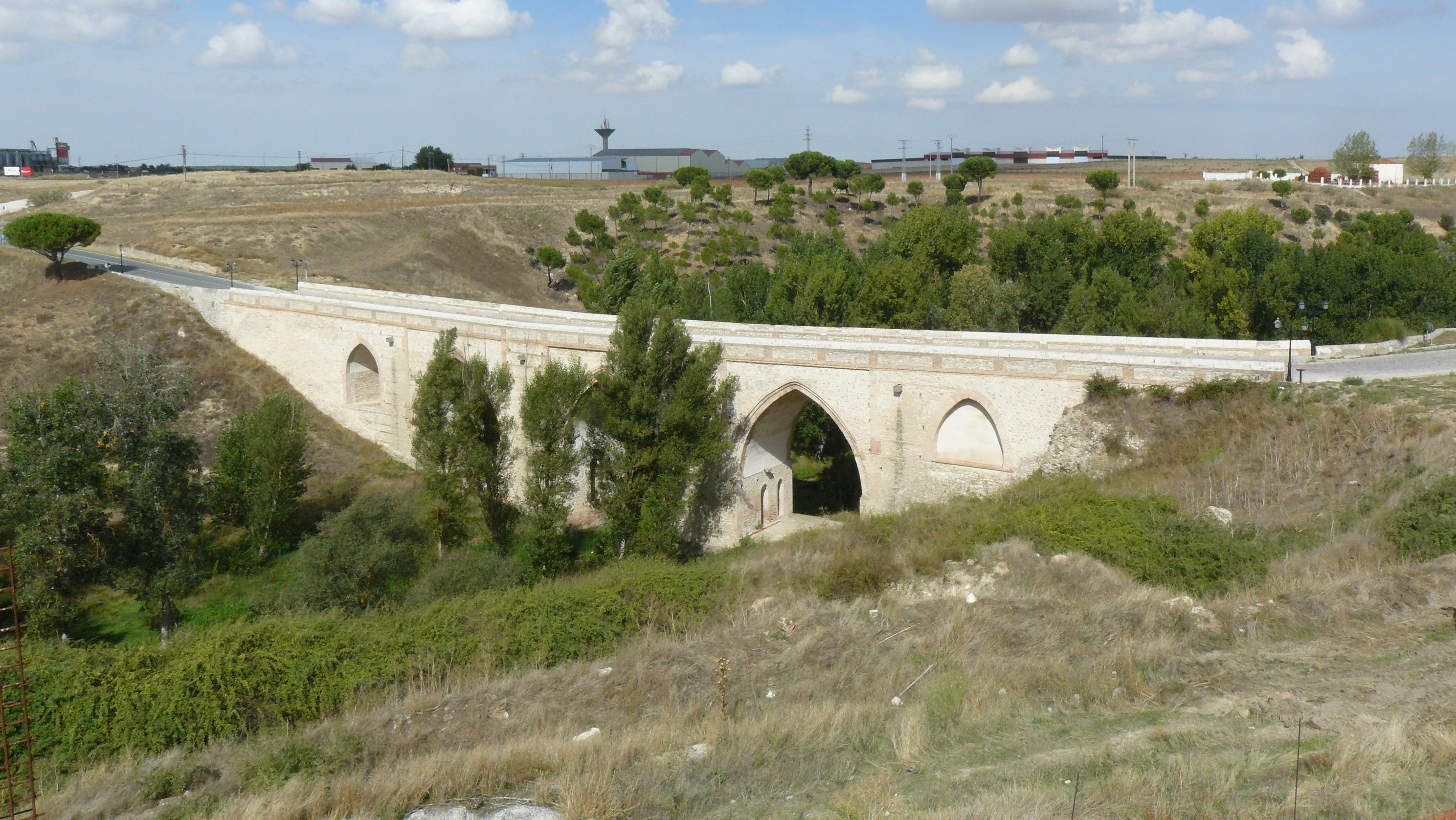 Puente de Medina, Arévalo, provincia de Ávila.